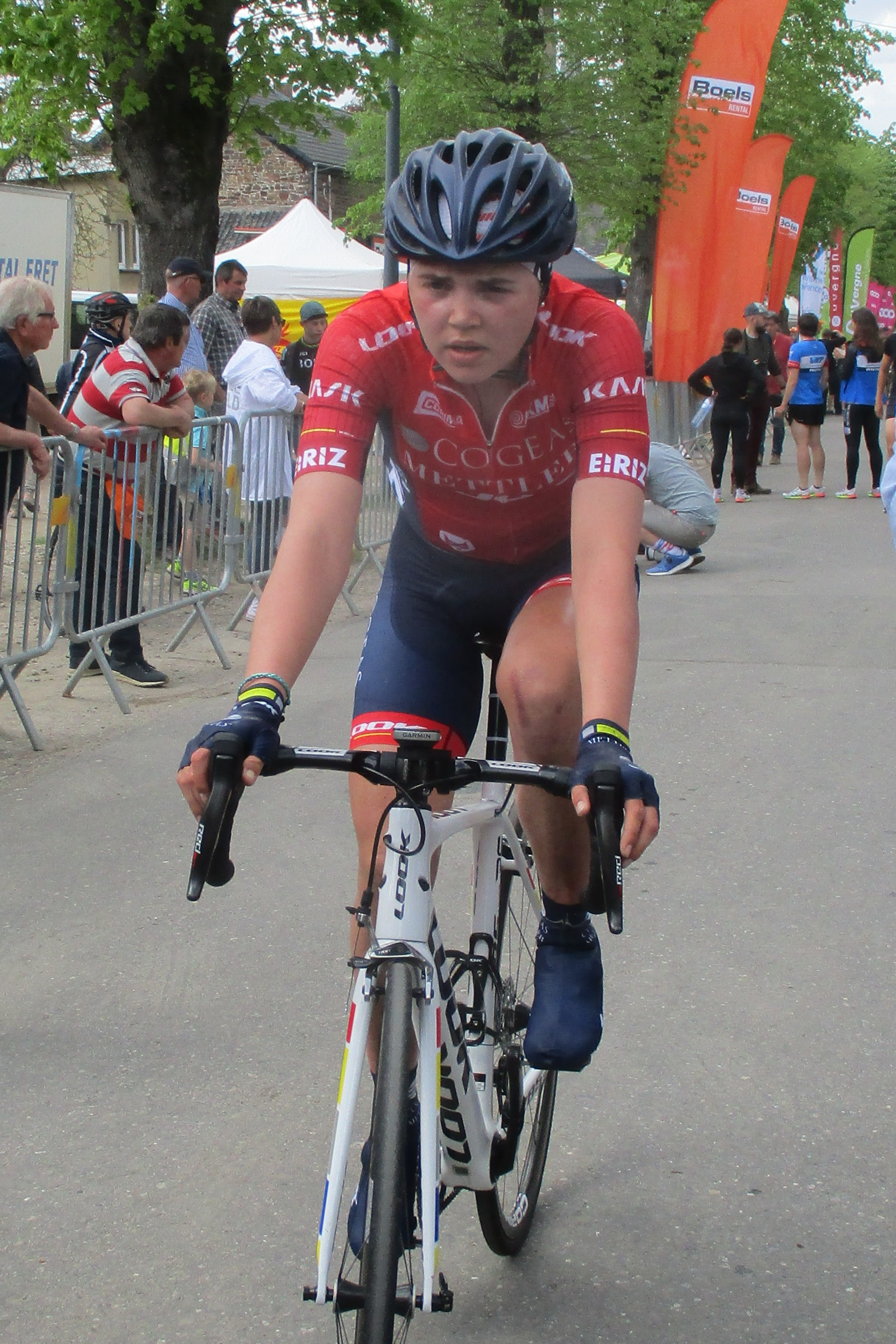 Finish van de Waalse Pijl 2019 voor vrouwen op de Mur de Huy